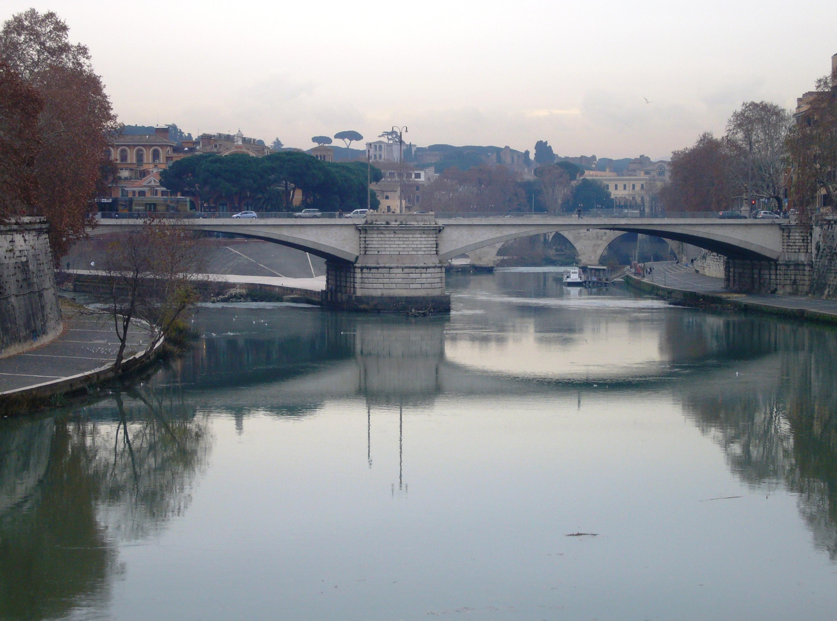 Roma, Ponte Garibaldi e (dietro) Ponte Cestio